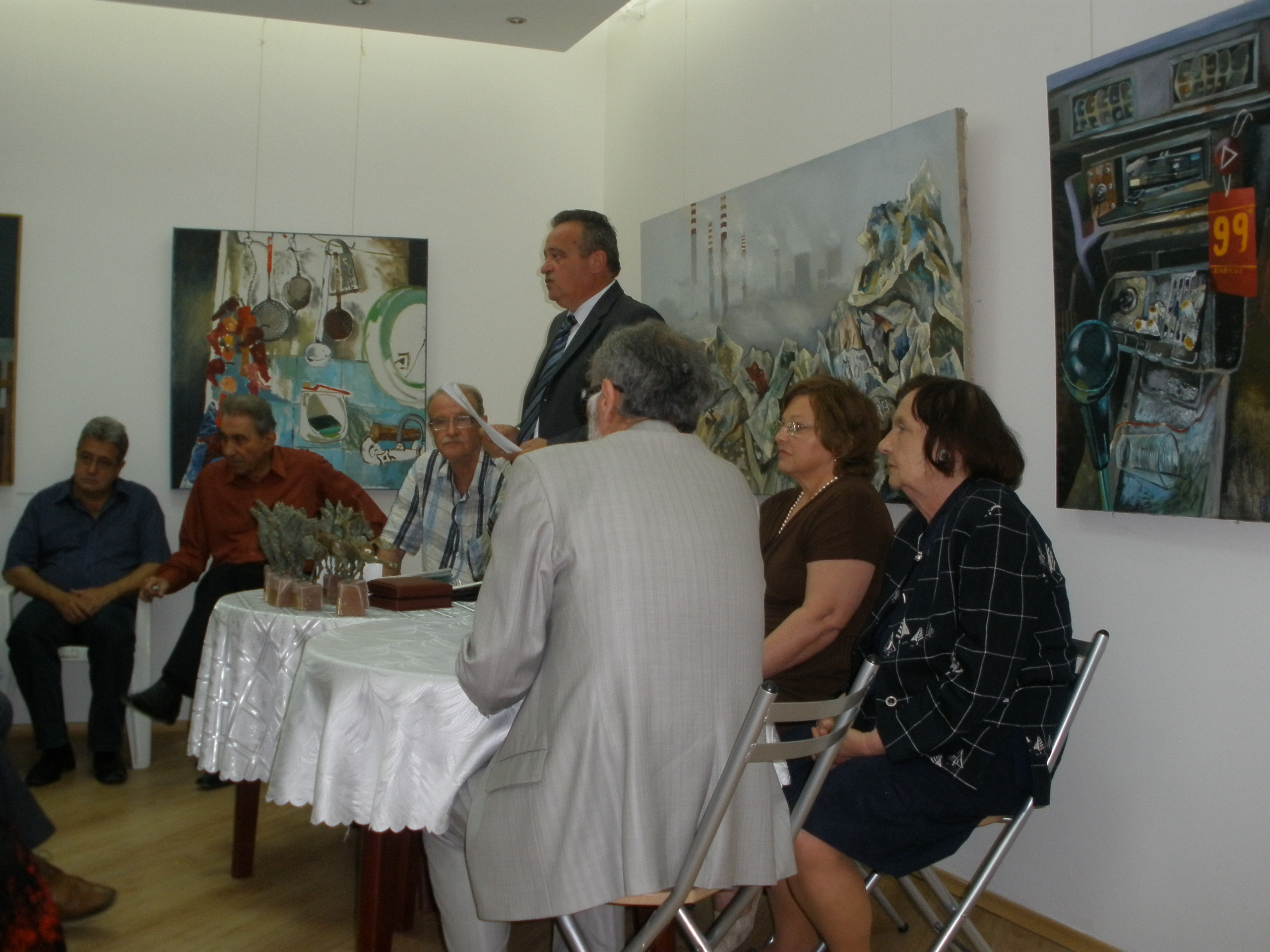 Комисия по награждаването на литературната награда Георги Братанов начело с Николай Петев - 2009